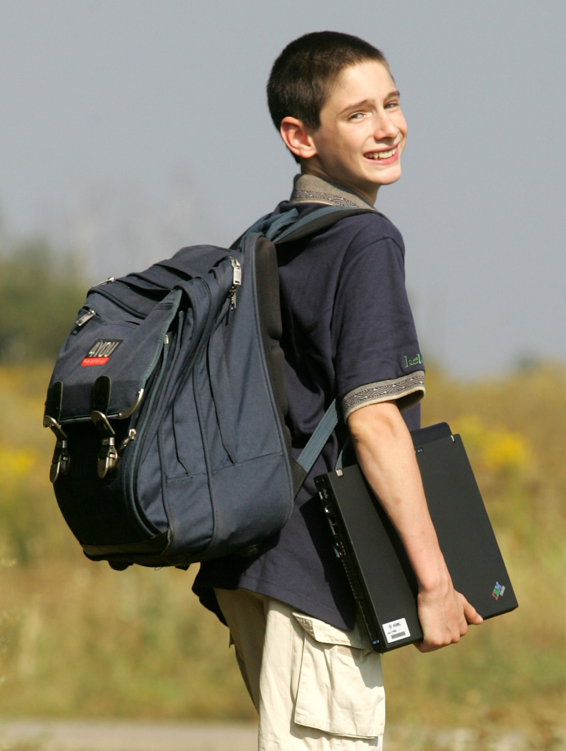 Leon Weber, fotografiert von Robert Michael für die Sächsische Zeitung